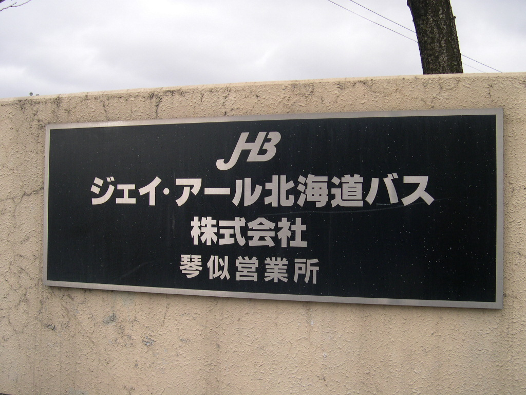 2005-5-5撮影